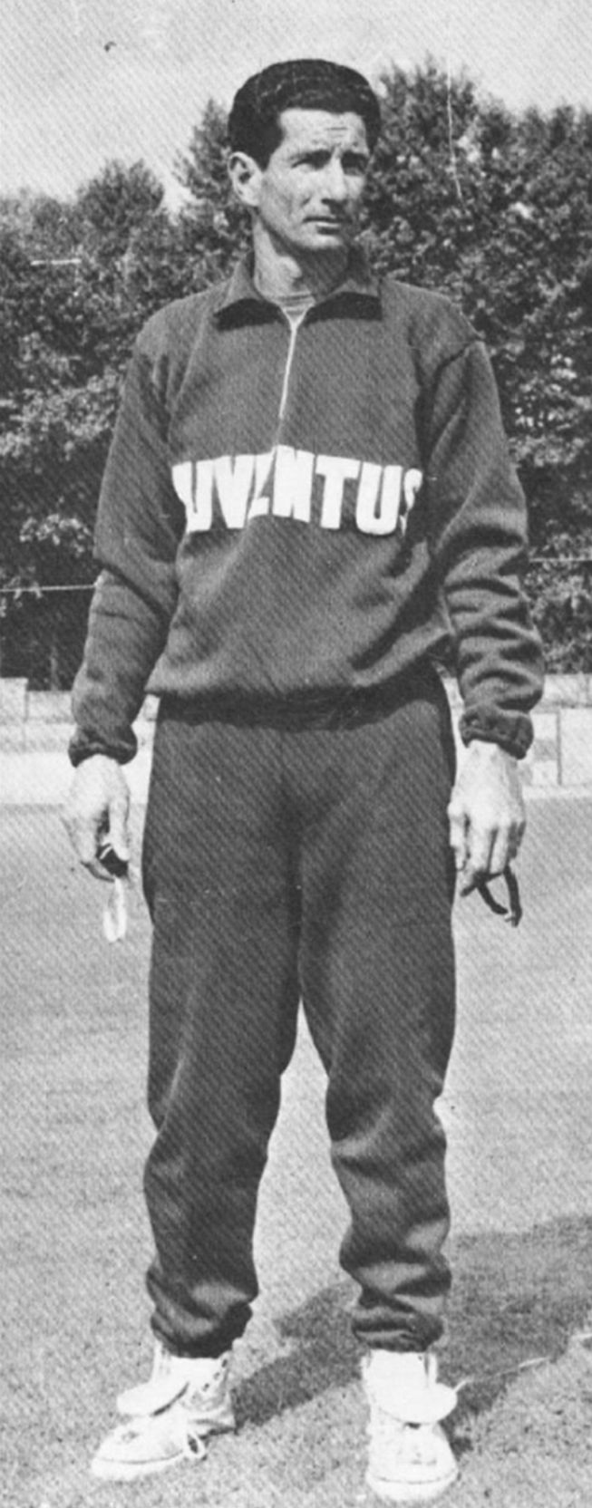 L'allenatore di calcio paraguaiano Heriberto Herrera alla Juventus nel corso degli anni 60 del XX secolo.